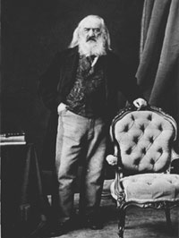 С.Г.Волконский